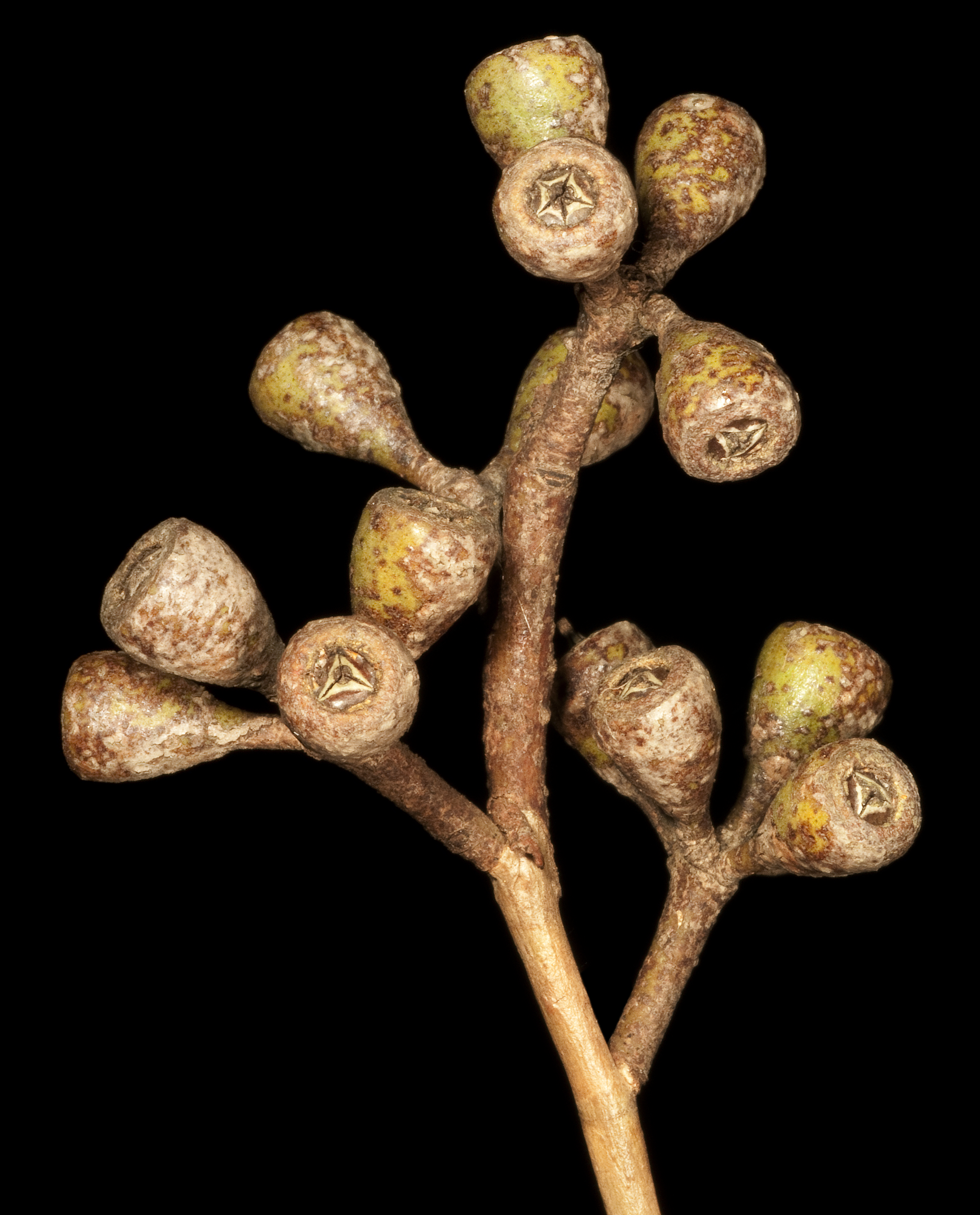 KRT4533